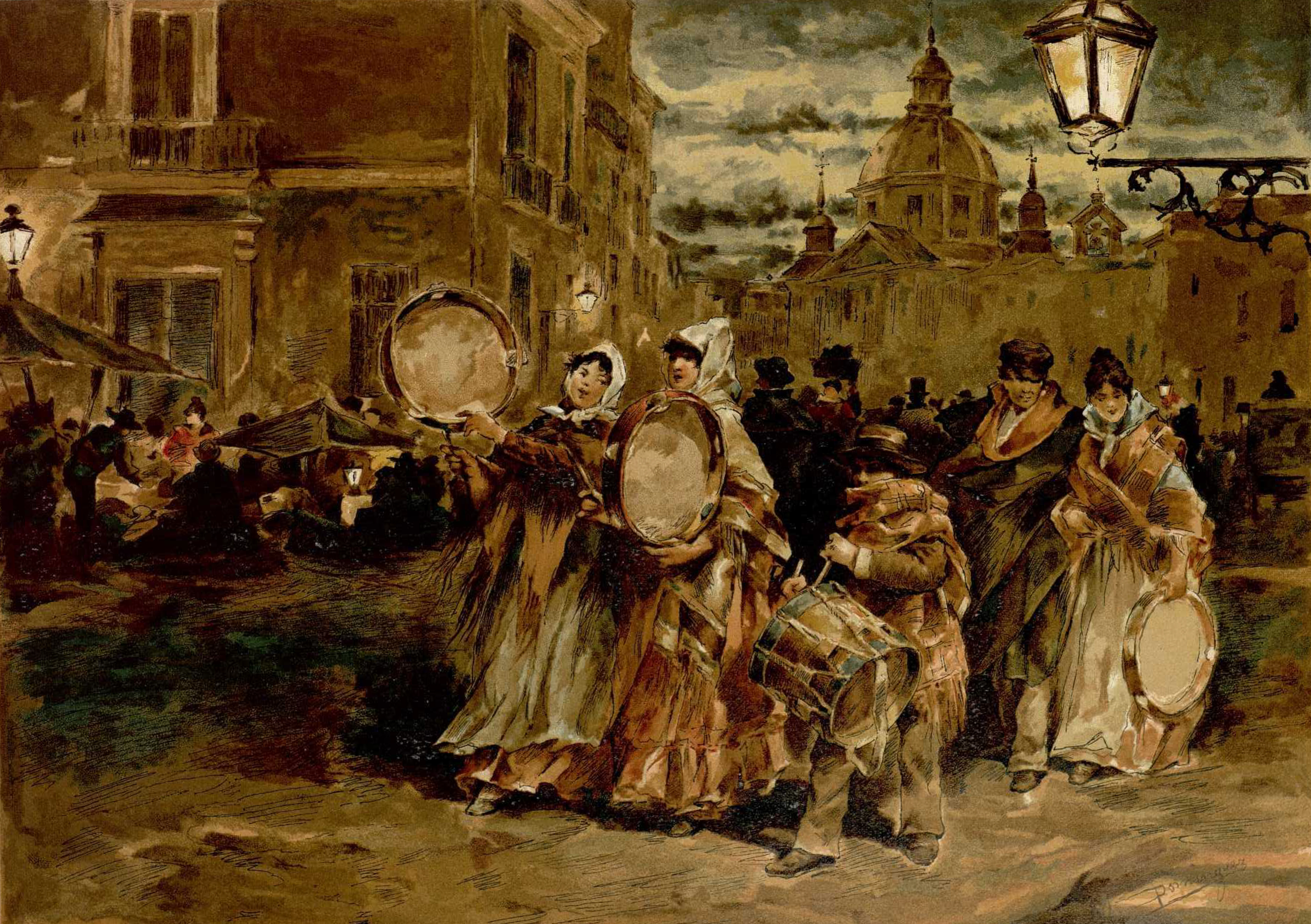 Diciembre.